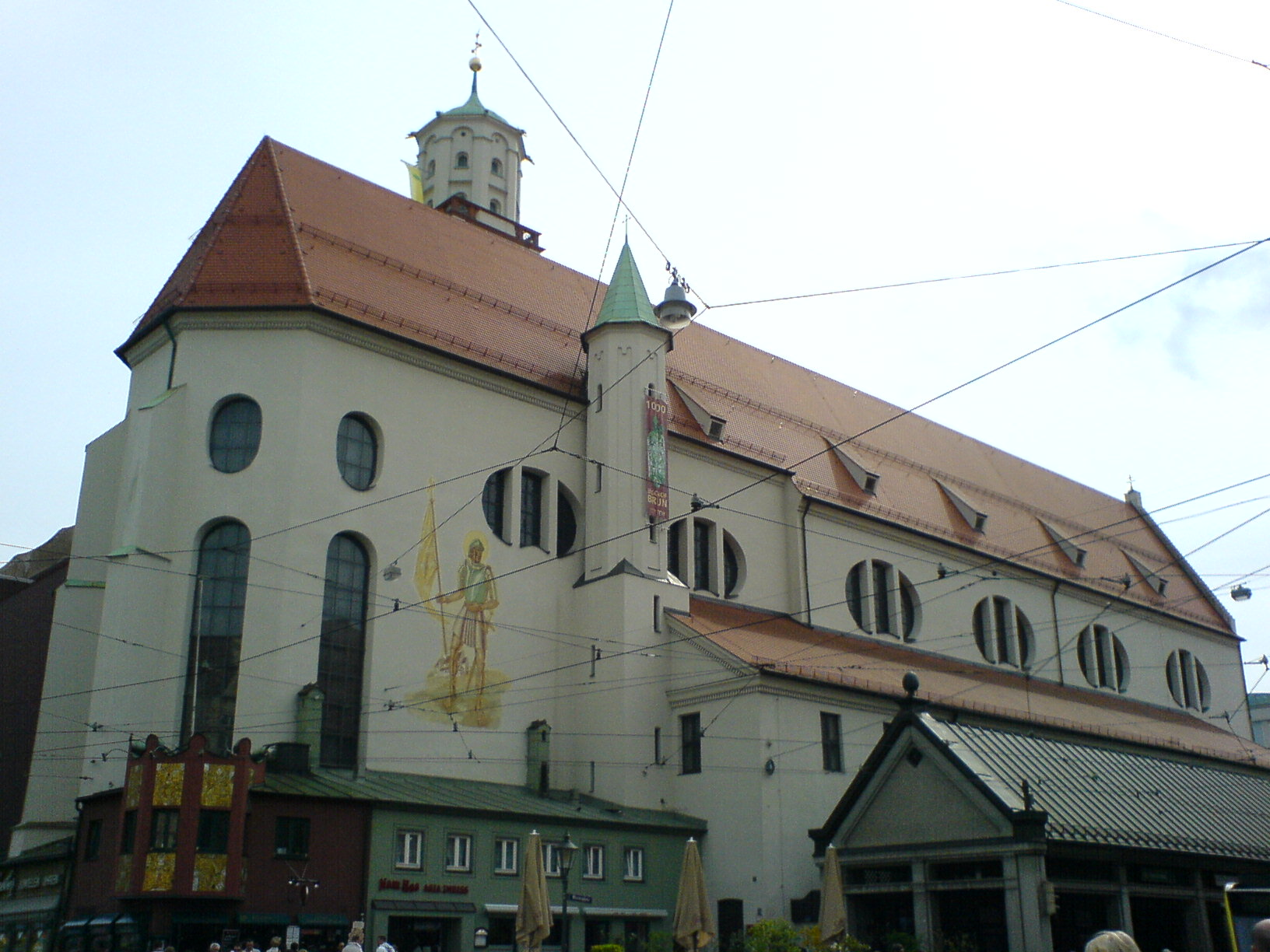 St.-Moritz-Kirche Augsburg